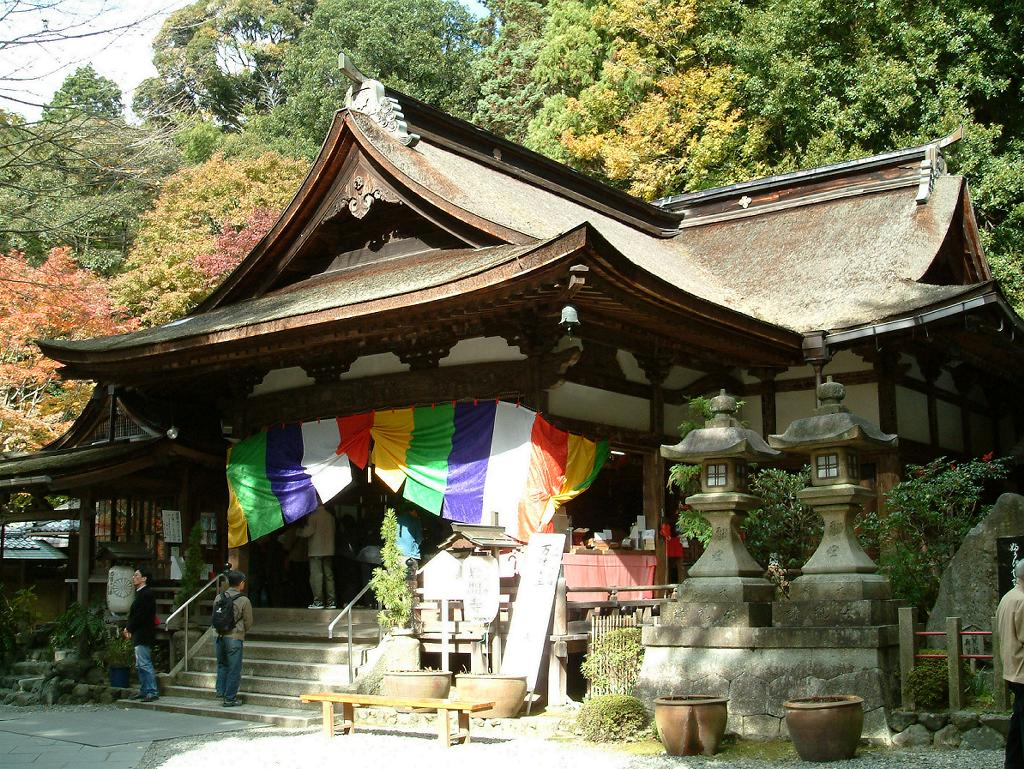 岩間寺の本堂